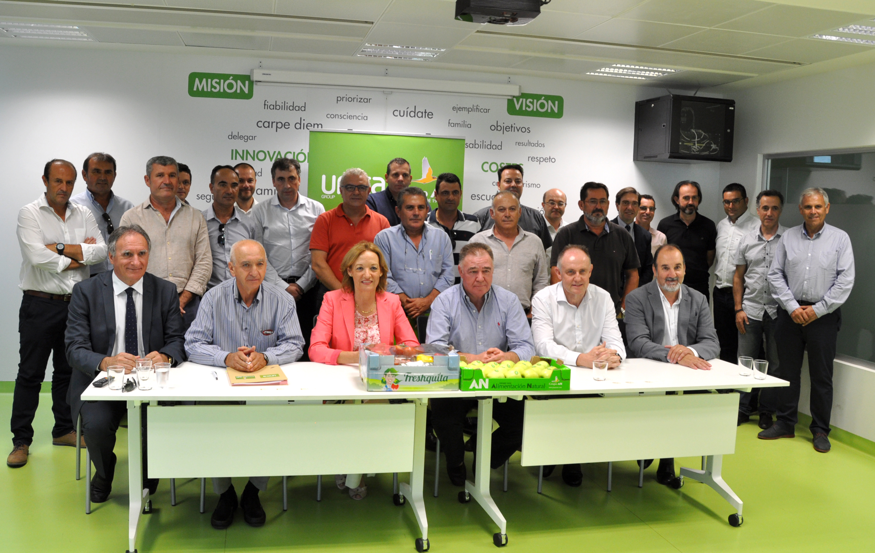 Recientemente UNICA Group se asocia al Grupo AN y comercializará todas las frutas y hortalizas en el mercado de fresco.